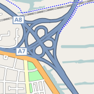 Knooppunt Zaandam on openstreetmap